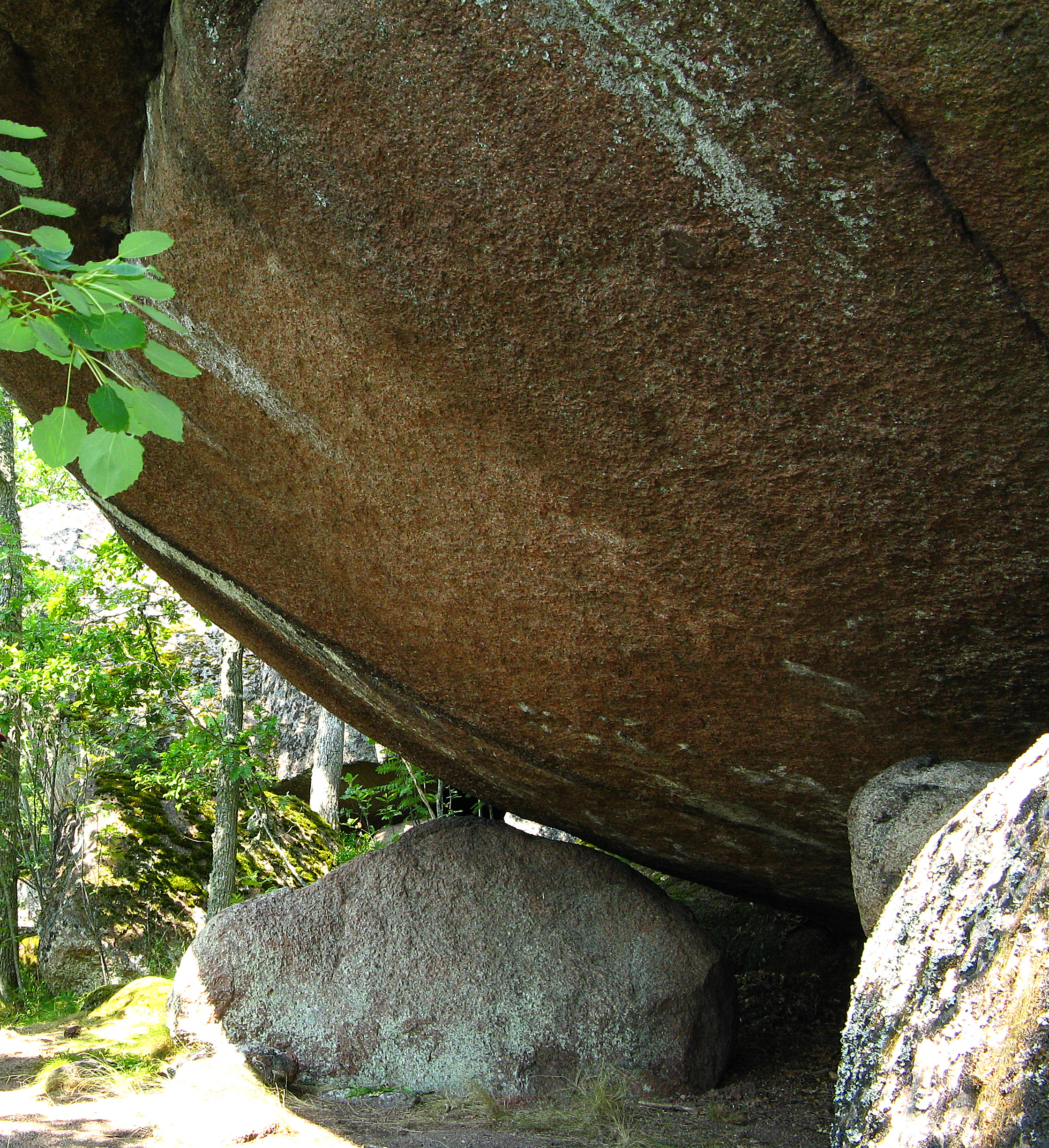 Klippöverhäng i Sydskogen i nationalparken Blå Jungfrun.